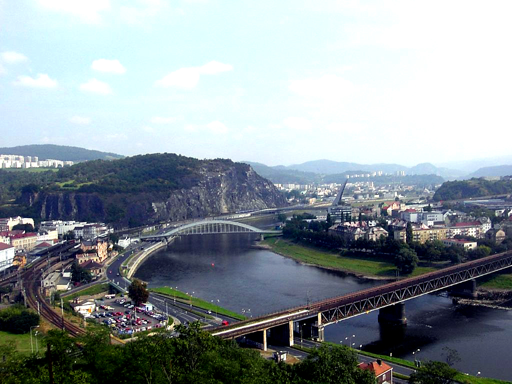 Pohled na údolí Labe a Mariánskou skálu.